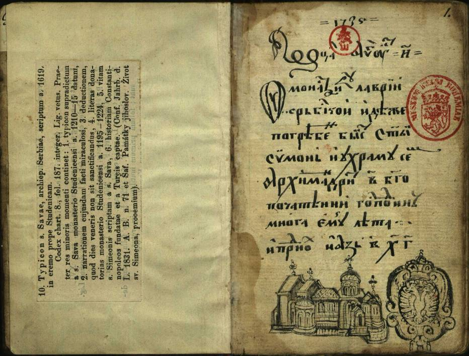 Дигитална копија комплетног рукописа Студеничког типика који је свети Сава написао 1208.г, по доласку у Србију на молбу брата Стефана. Свети Сава постаје старешина манастира где активно ради на организацији монашког живота у Студеници. Овај црквени устав, тј. правилник о богослужењима и животу монаха у манастирима, Сава пише по узору на Хиландарски типик. Значај Студеничког типика је највише у томе што ће постати главна основа за устав Српске православне цркве. Дигитална копија Студеничког типика добијена је љубазношћу директора Националног музеја у Прагу, господина Михала Лукеша. Оригинал се чува у том музеју под сигнатуром IX H 8 – Š10